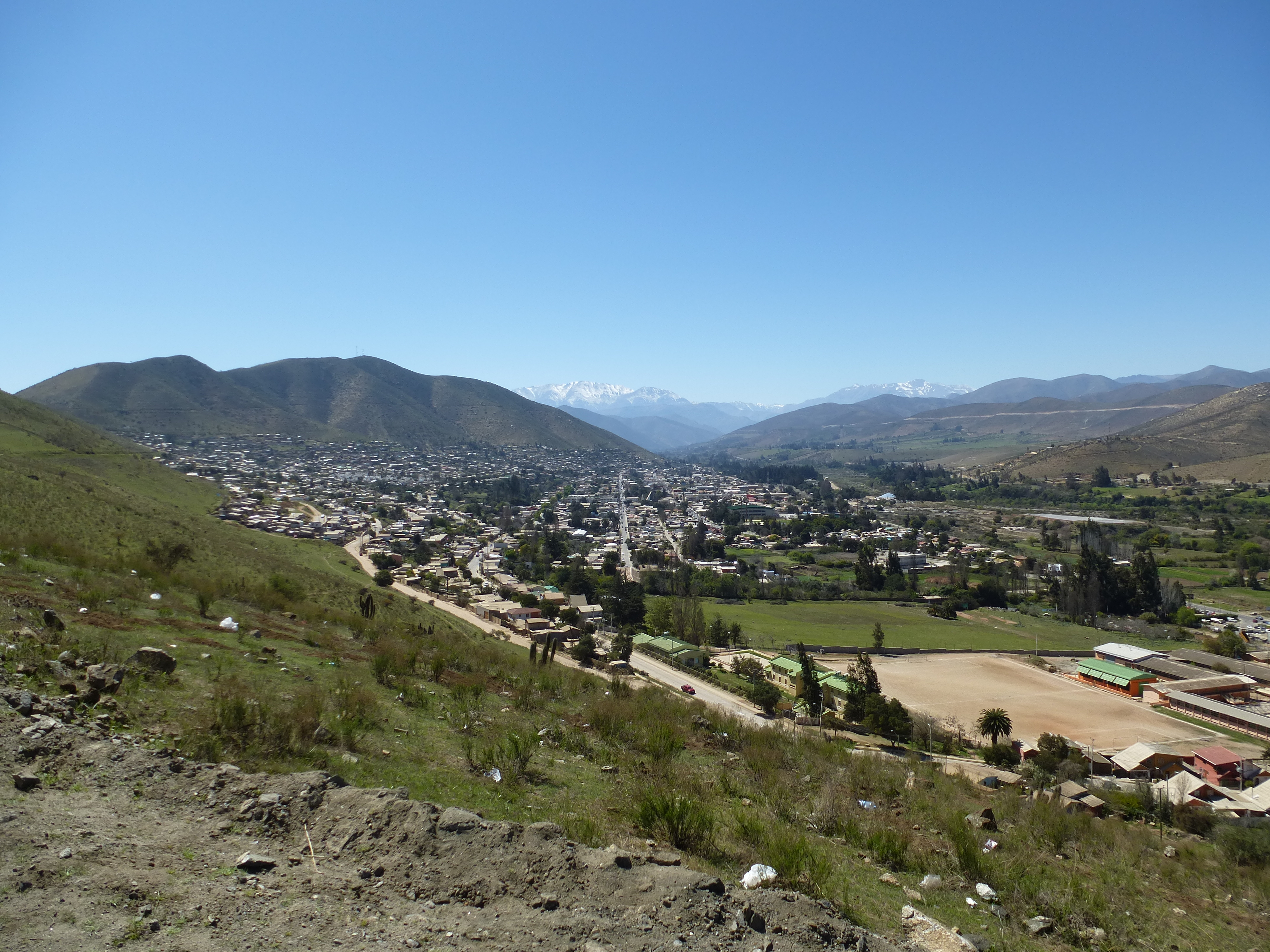 Imagen panorámica de la ciudad de Illapel, tomada desde el Cerro El Calvario.